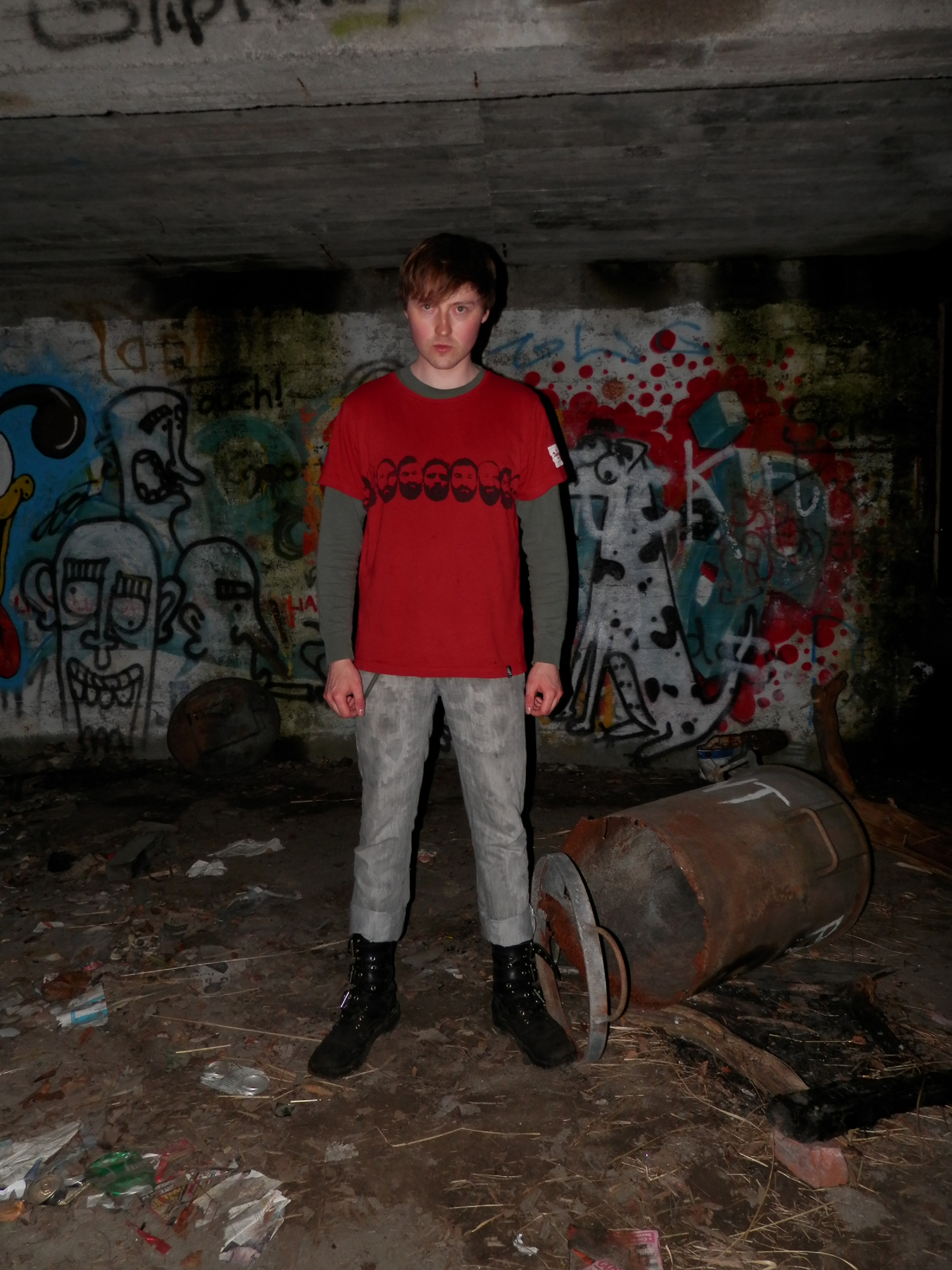 Urmas Lüüs